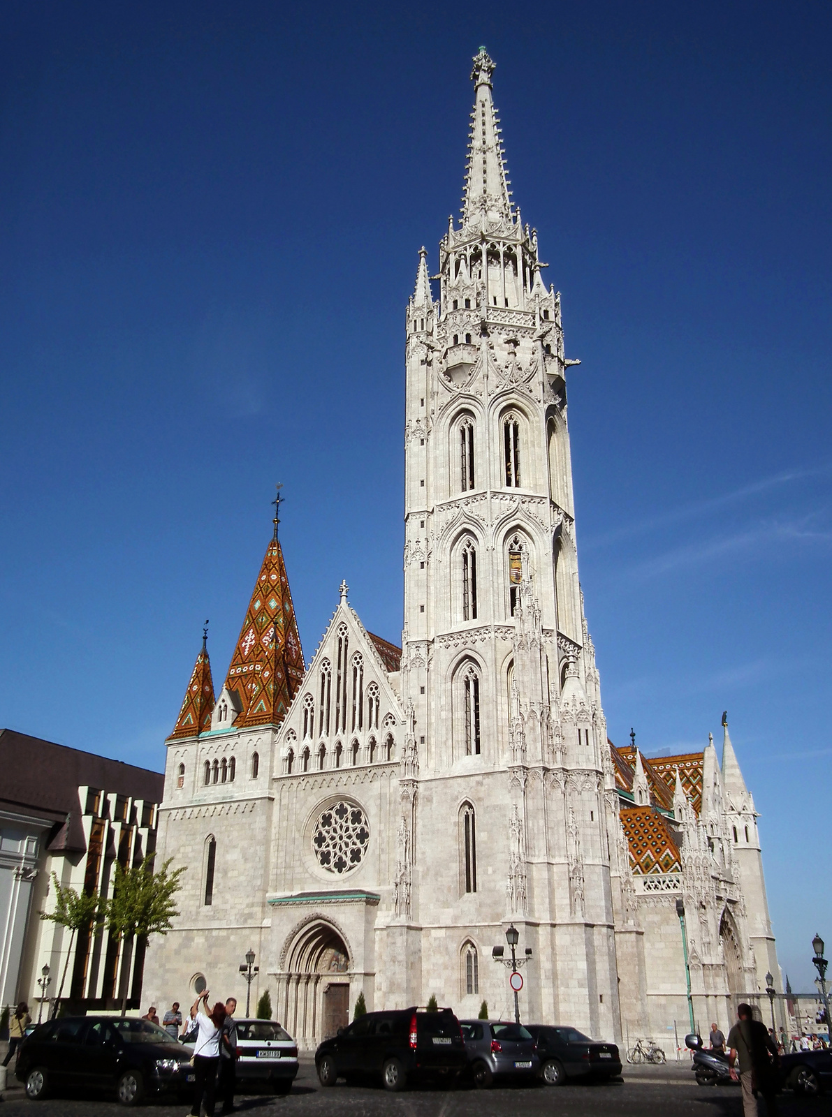 Mátyás templom (Budapest 1, Szentháromság tér) This is a photo of a monument in Hungary. Identifier: 139